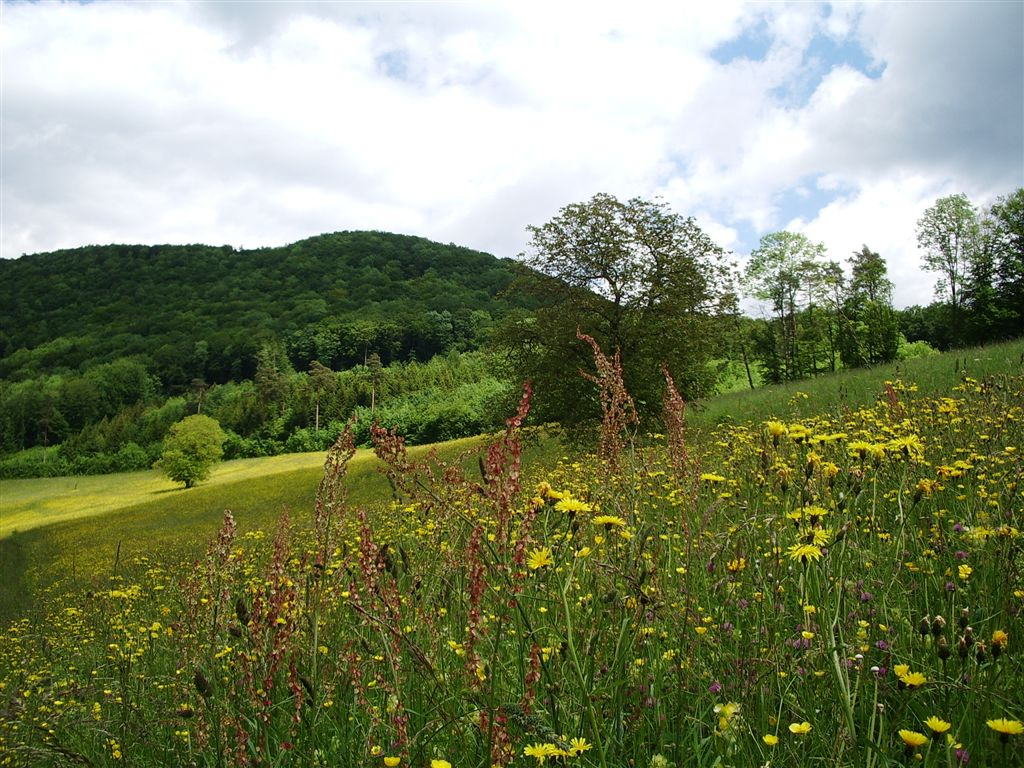 Magerwiese oberhalb von Siblingen mit Blick auf den Randen. Foto im Juni 2006 selbst aufgenommen.